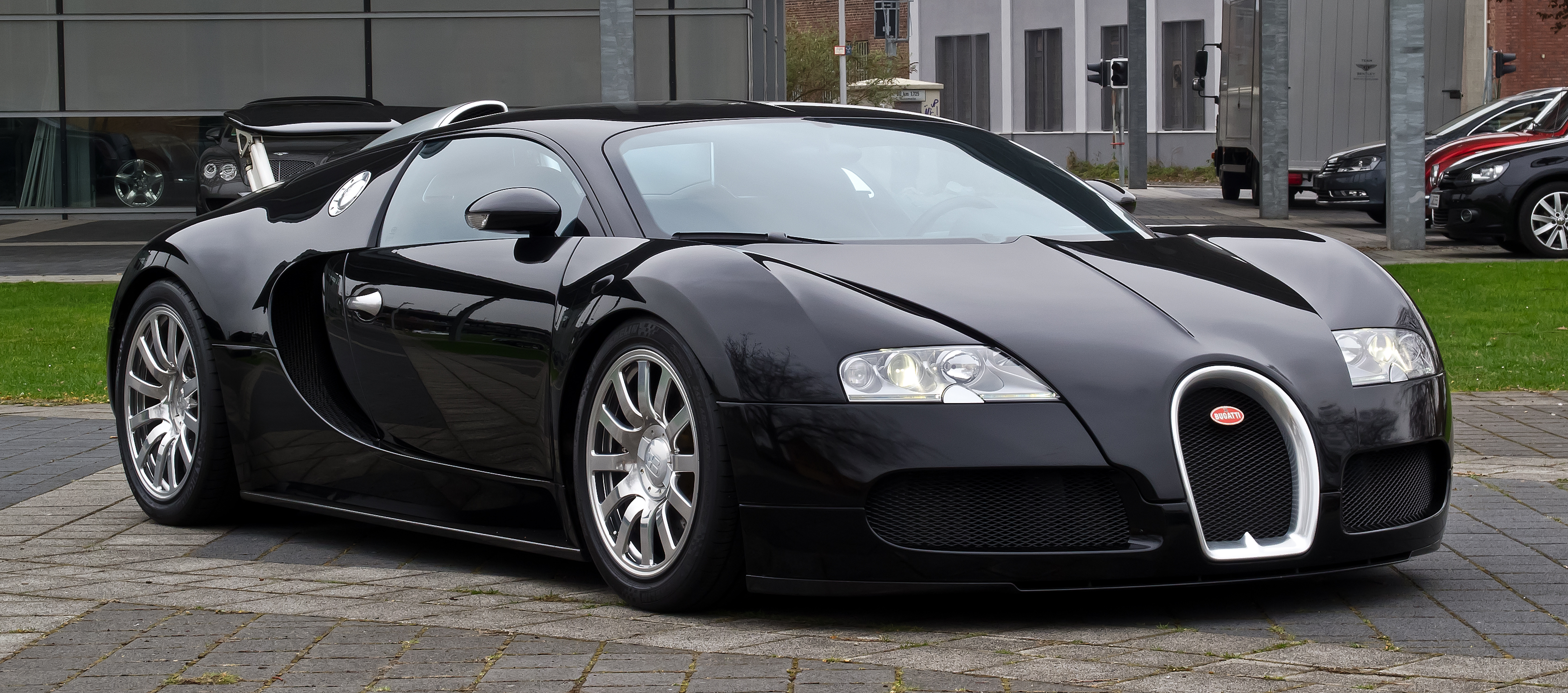 Bugatti Veyron 16.4